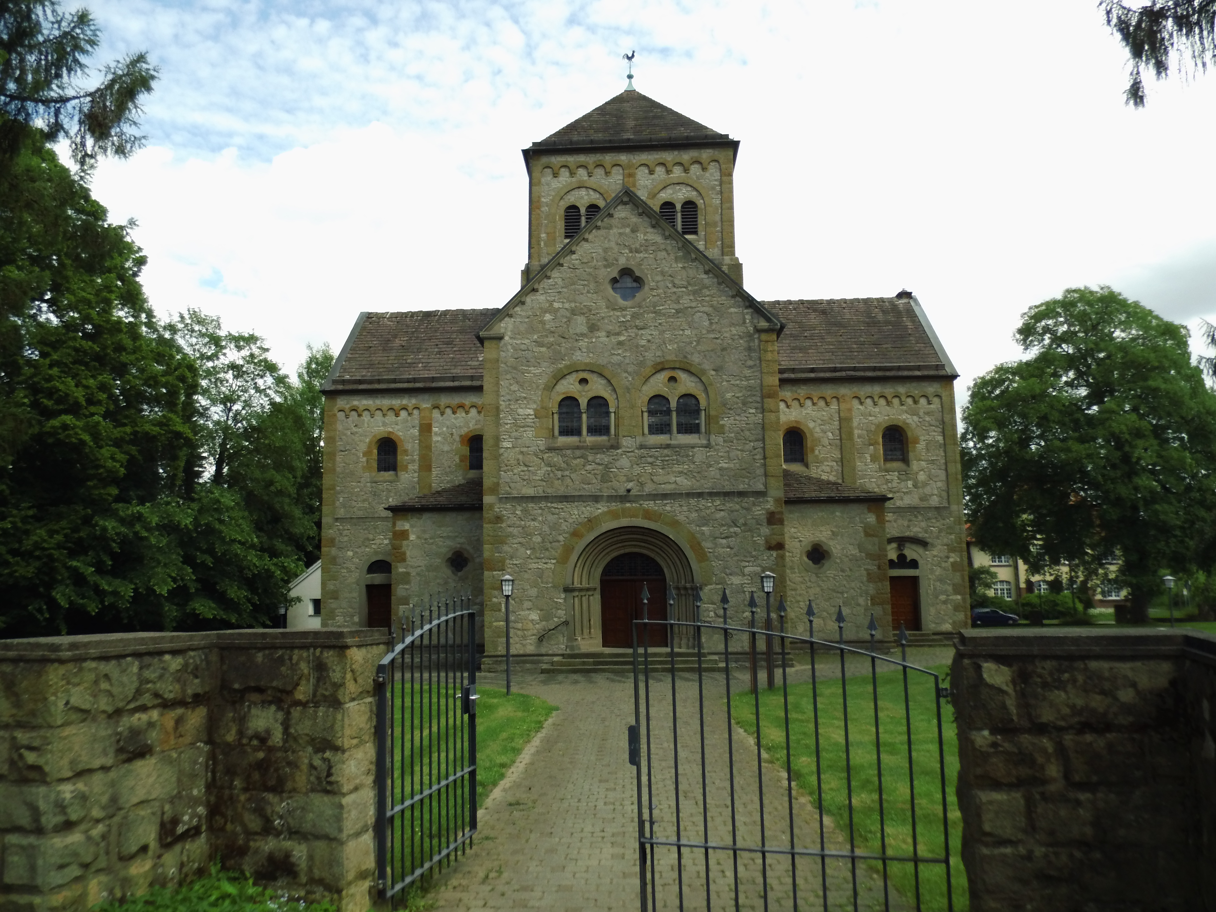 Kirche wurde erbaut im neuromanischen Stil von 1923-28; Zentralbau aus Bruchsteinmauern; Vierungsturm unter flachem Zeltdach; Ostapsis; weitesgehends durch Eigenarbeit der Gemeindemitglieder errichtet